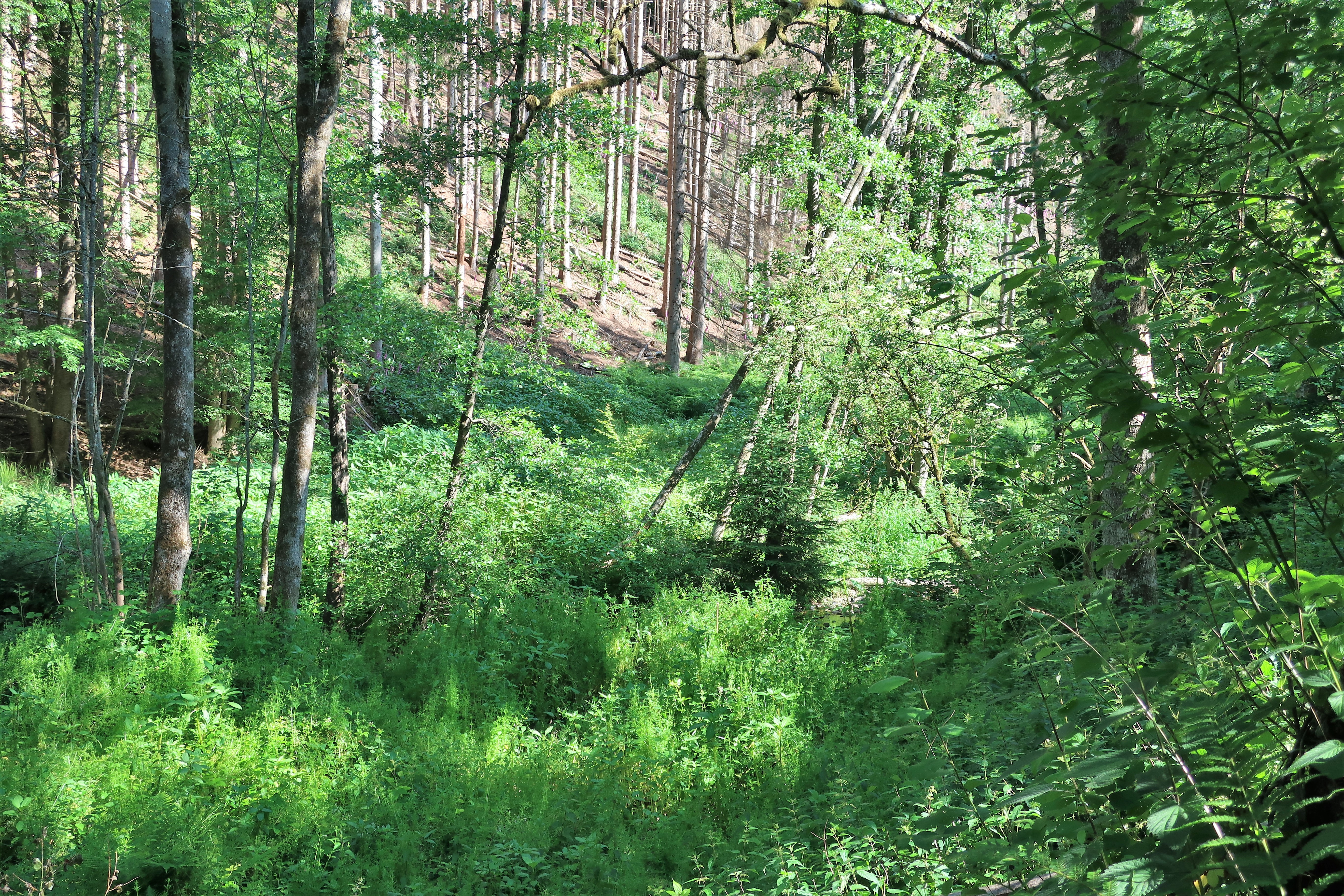 Geschützter Landschaftsbestandteil 1.4.2.70 „Buscher Berg“ in Hagen, nördlich des Motodroms und westlich der Selbecker Straße. Es handelt sich um einen alten Buchenbestand mit einem Quellsiepen und Felsklippen der Brandenberg-Schichten des Mitteldevons sowie einem teilweise waldfreien Abschnitt der Köttinger Bachaue. Im Schutzgebiet liegt auch das Grubenfeld Georgine mit mehreren stillgelegten Eisenerzstollen.